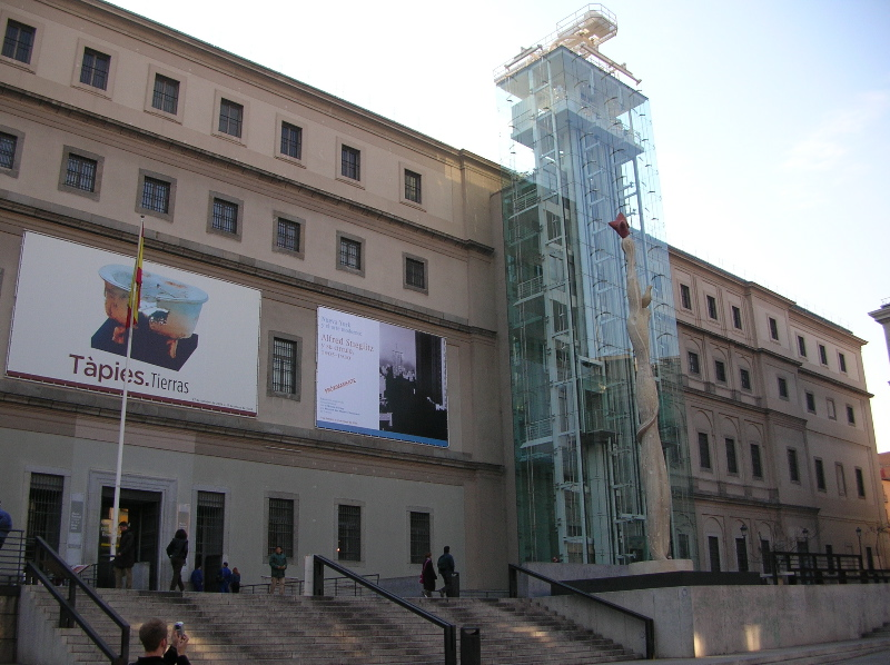 The Museo Nacional Centro de Arte Reina Sofía in Madrid